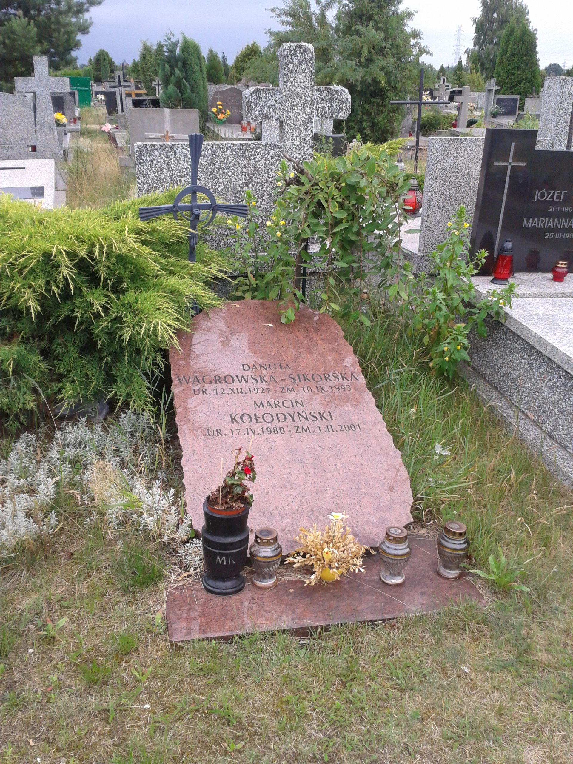 Grób Marcina Kołodyńskiego, cmentarz na Wólce Węglowej